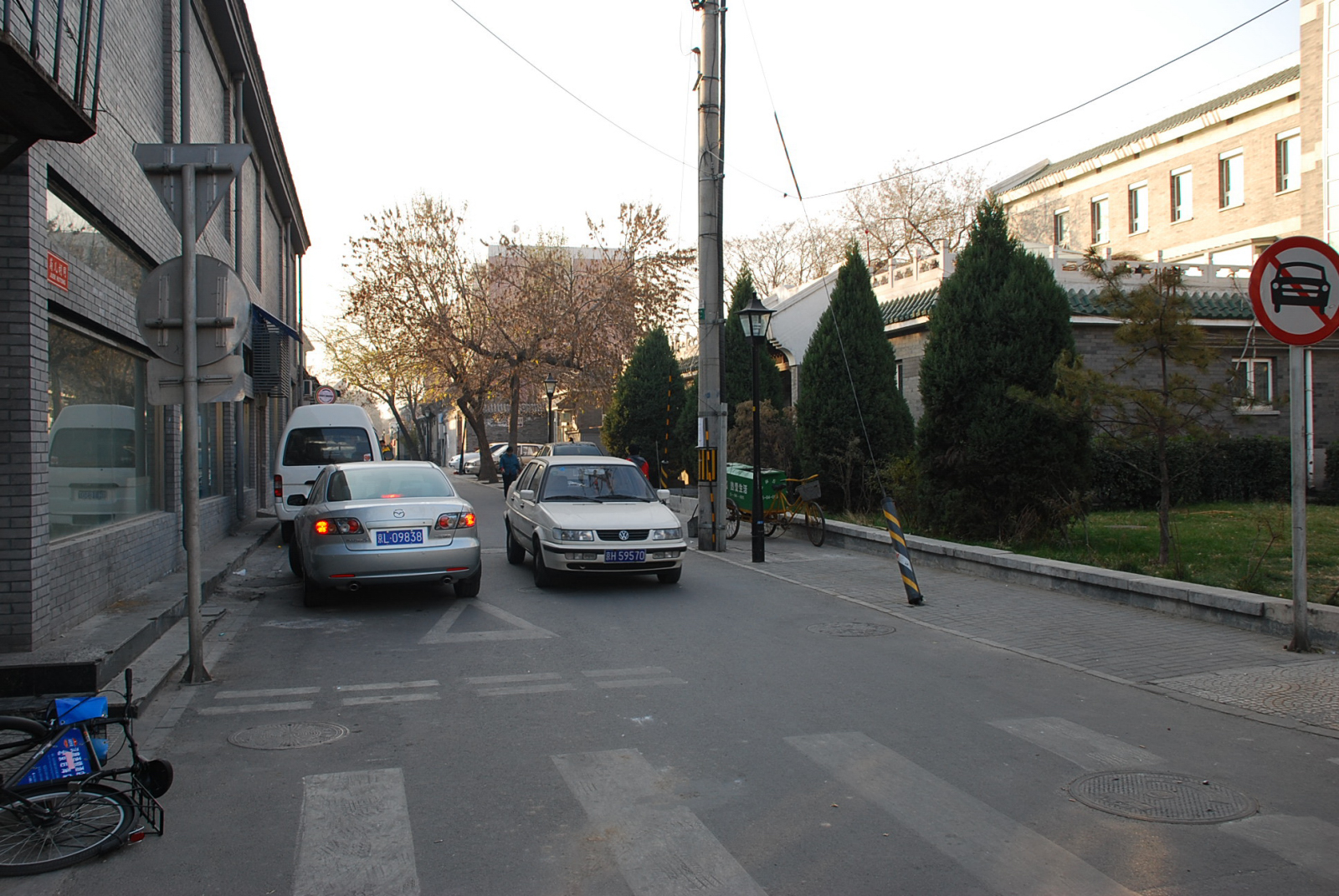 菊儿胡同东口